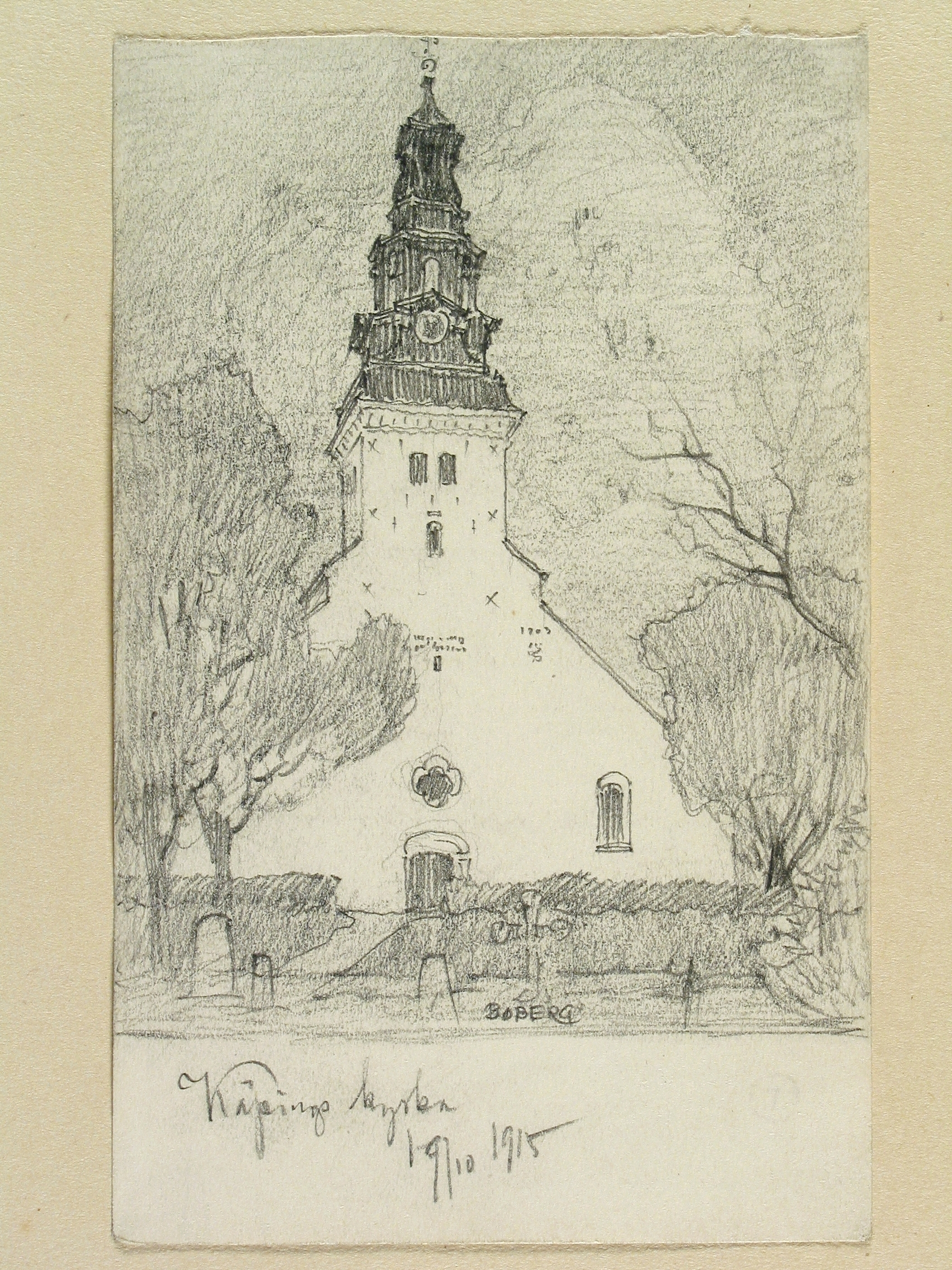 Köpings kyrka. Teckning av Ferdinand Boberg Depicted place: Köpings kyrka (Ortnamn därutöver), Sweden (Q34)